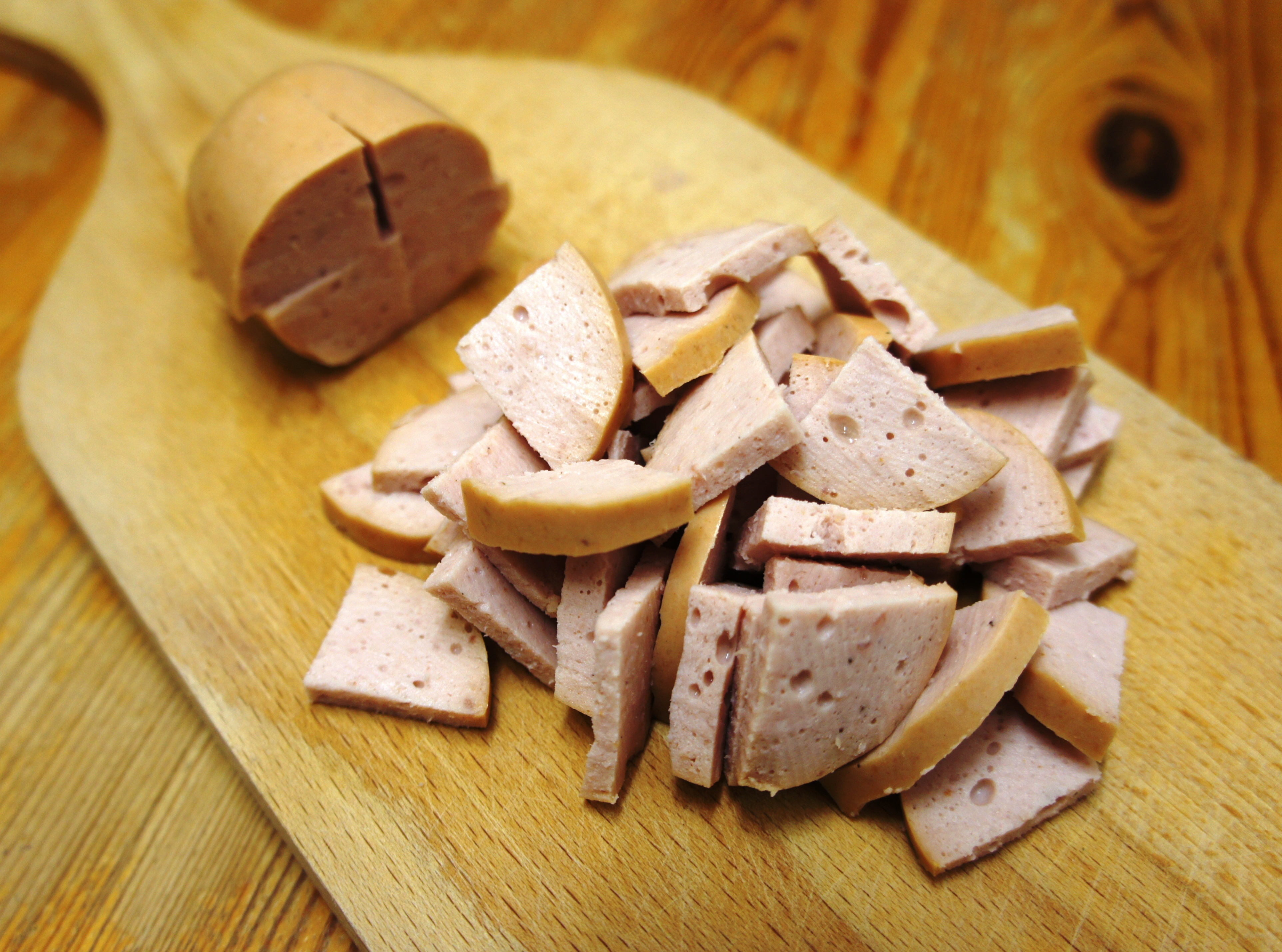 Cervelat - typischer Schnitt für Wurstsalat.